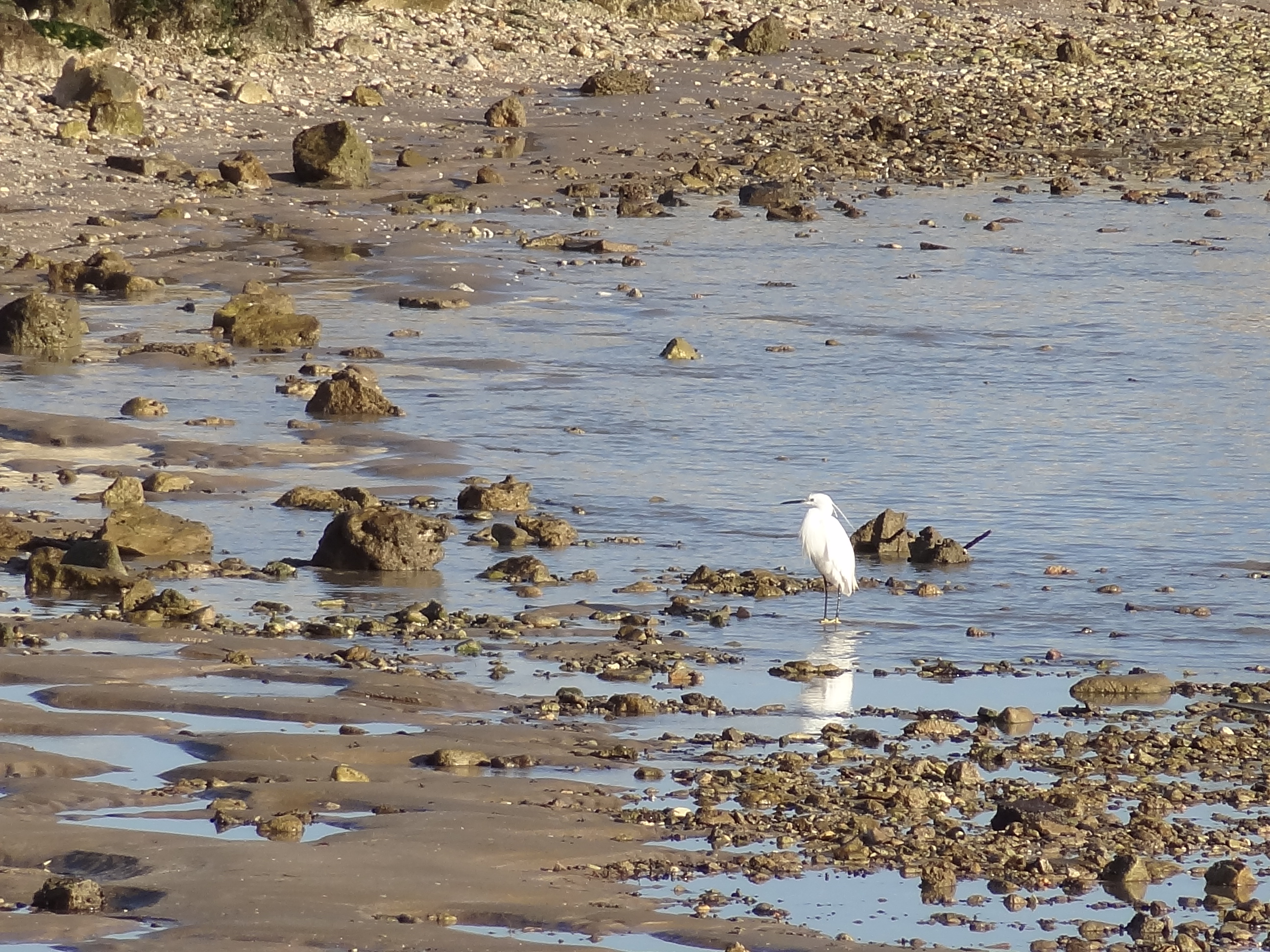 Ile d'Oléron, Charente Maritime, France. Aigrette blanche en quête de nourriture